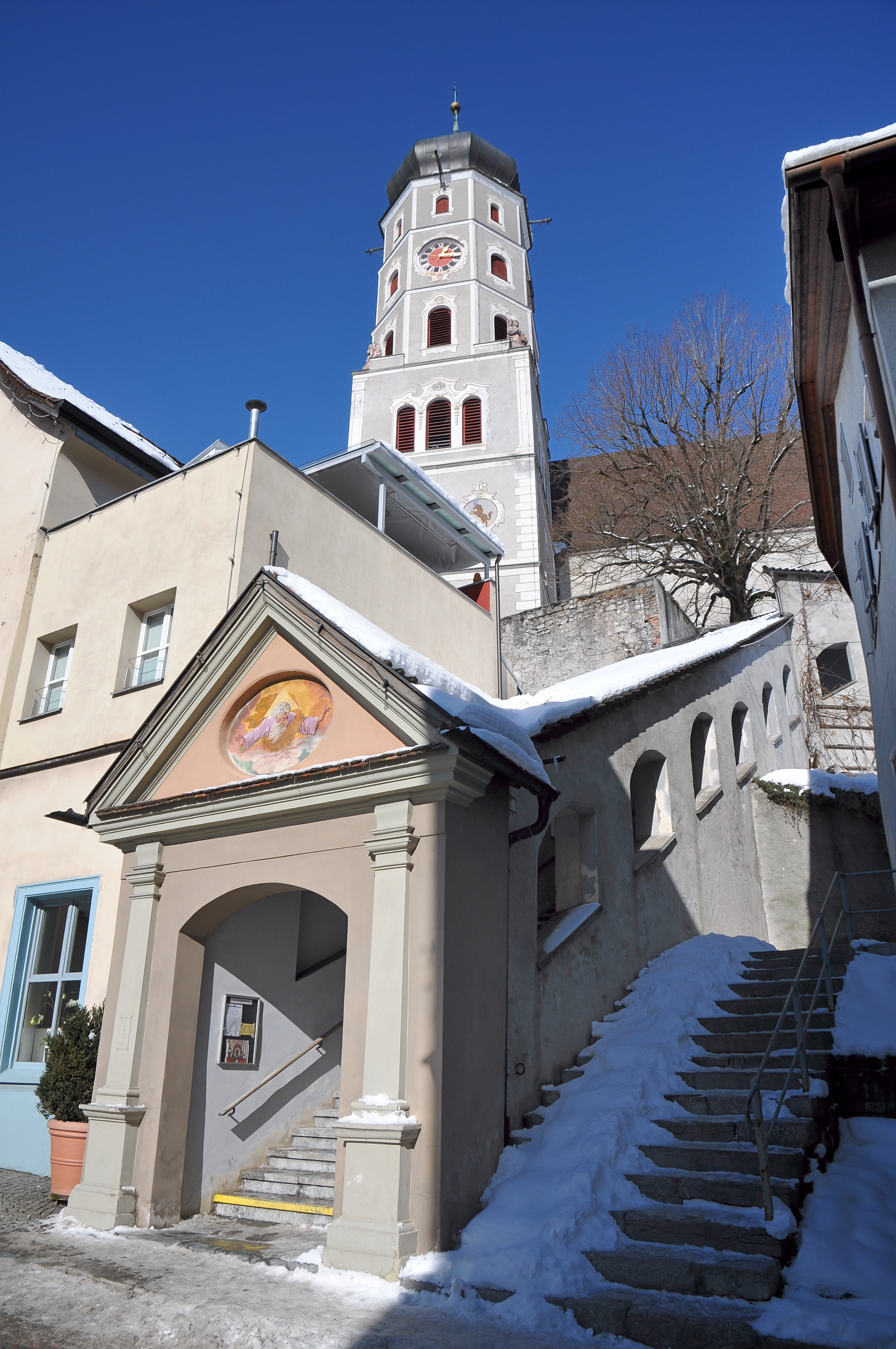 Aufgang von der Altstadt der Kirche “Laurentiuskirche (Bludenz)” in Bludenz, Vorarlberg.